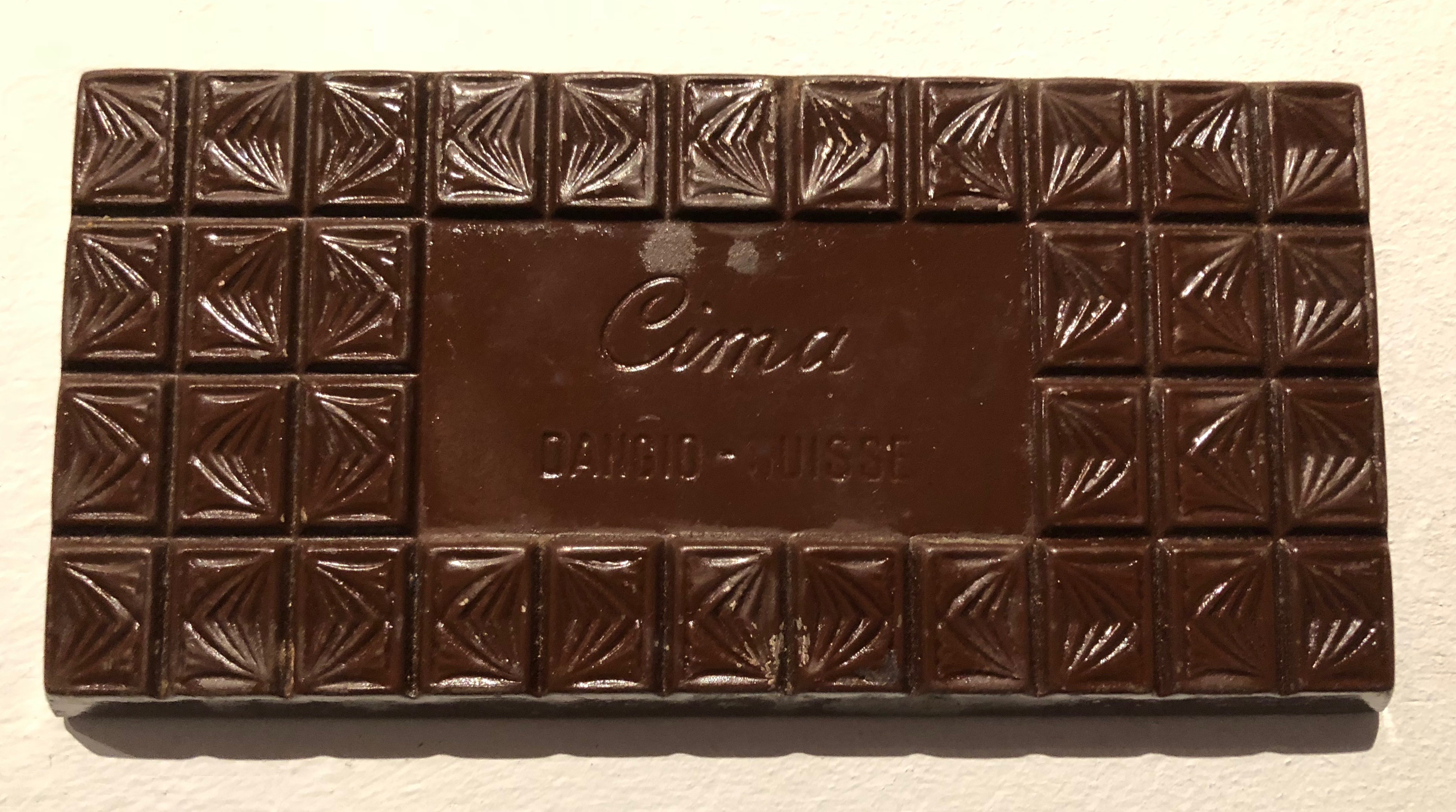 Fabbrica di Cioccolato Cima Norma Schokoladentafel